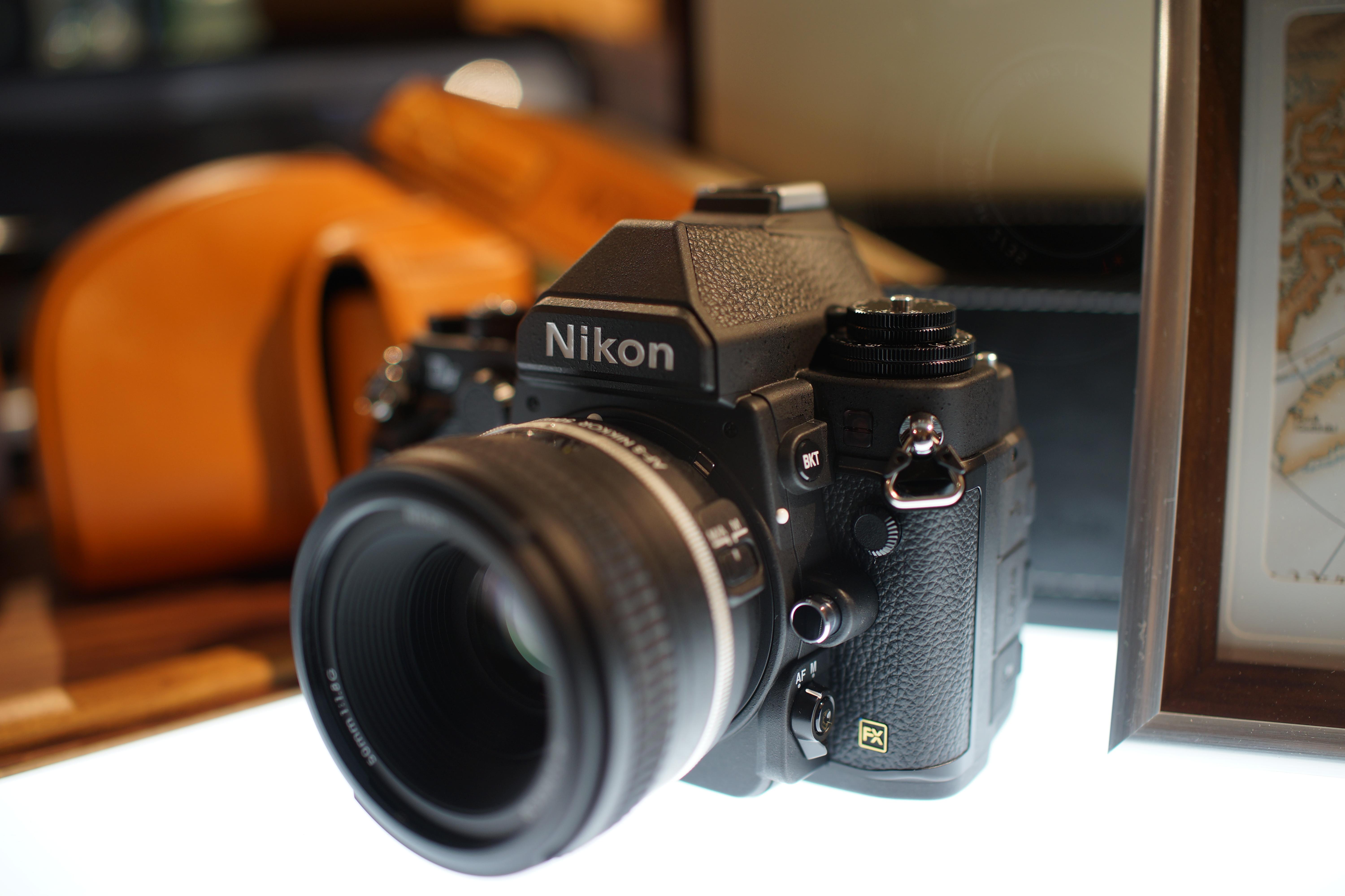 Nikon Df